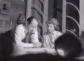 Ilena et Cezar Lazarescu